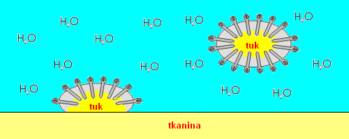 Princip rozpouštění tuků v mýdlových micelách